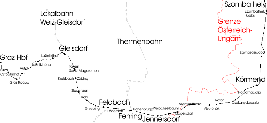 Verlauf der Steirischen Ostbahn